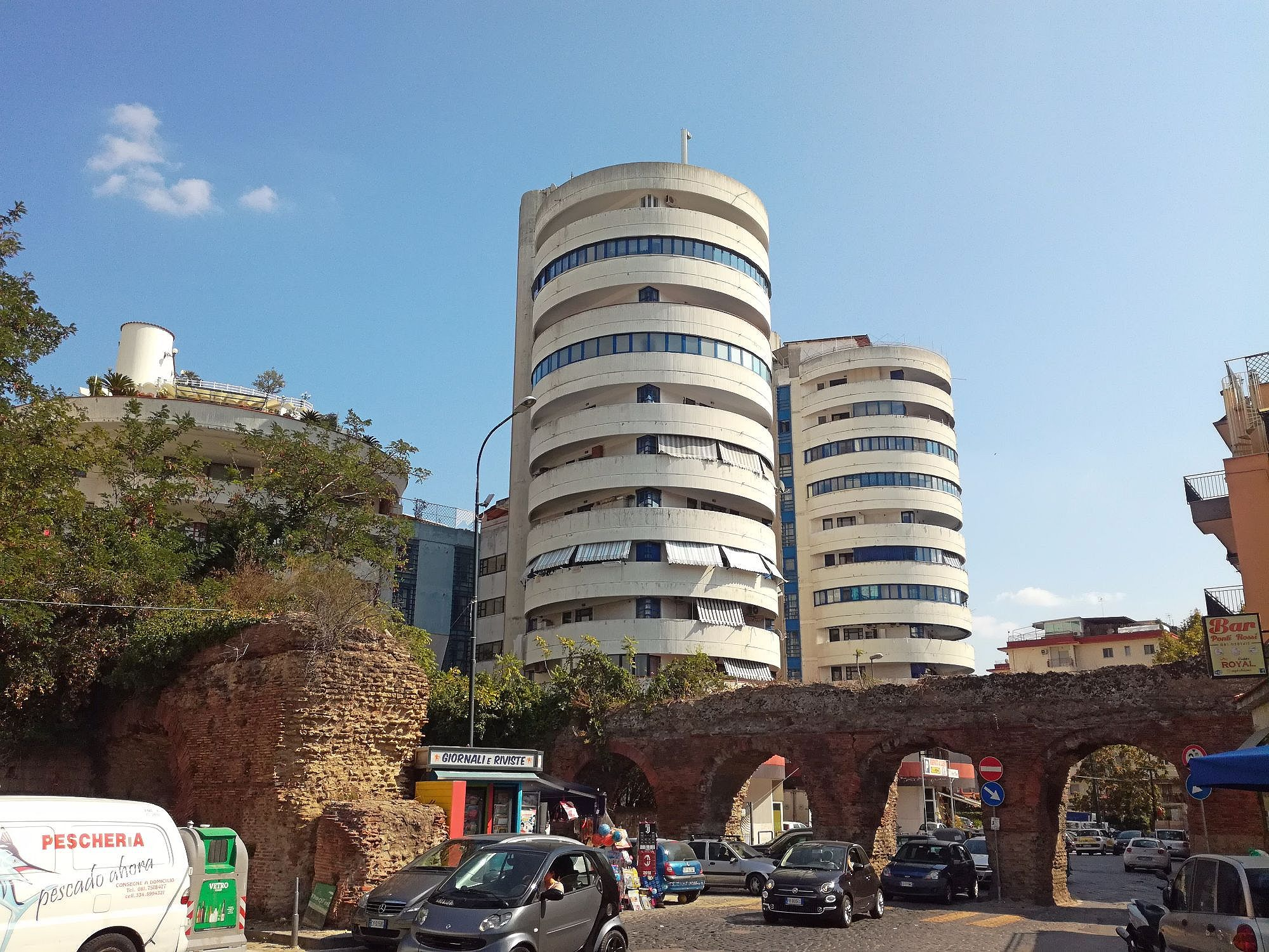 Ponti Rossi (acquedotto romano - Napoli)